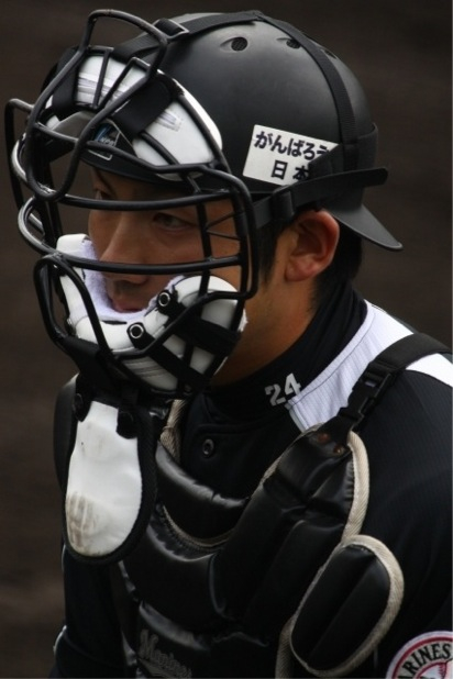 日本プロ野球 千葉ロッテマリーンズ 小池翔大 捕手